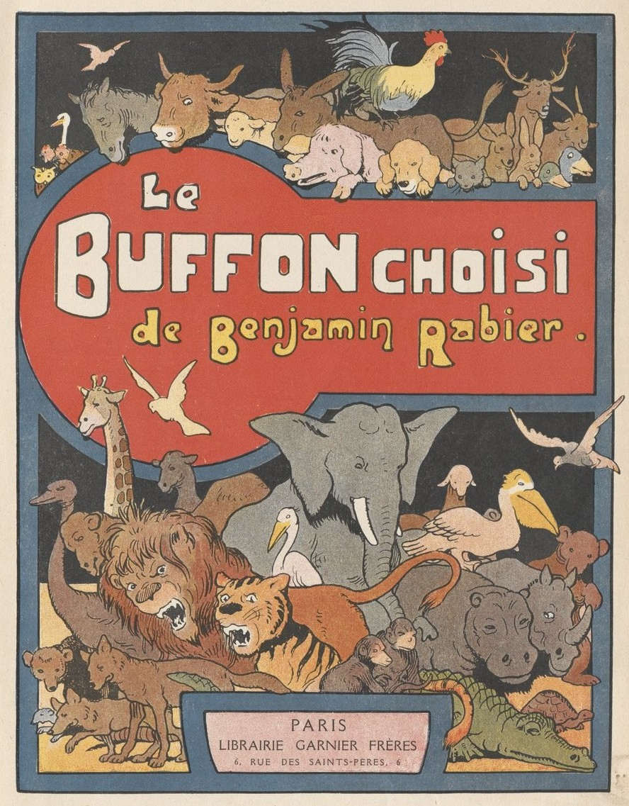 Benjamin Rabier, Le Buffon choisi, 1913 : couverture (Gallica)